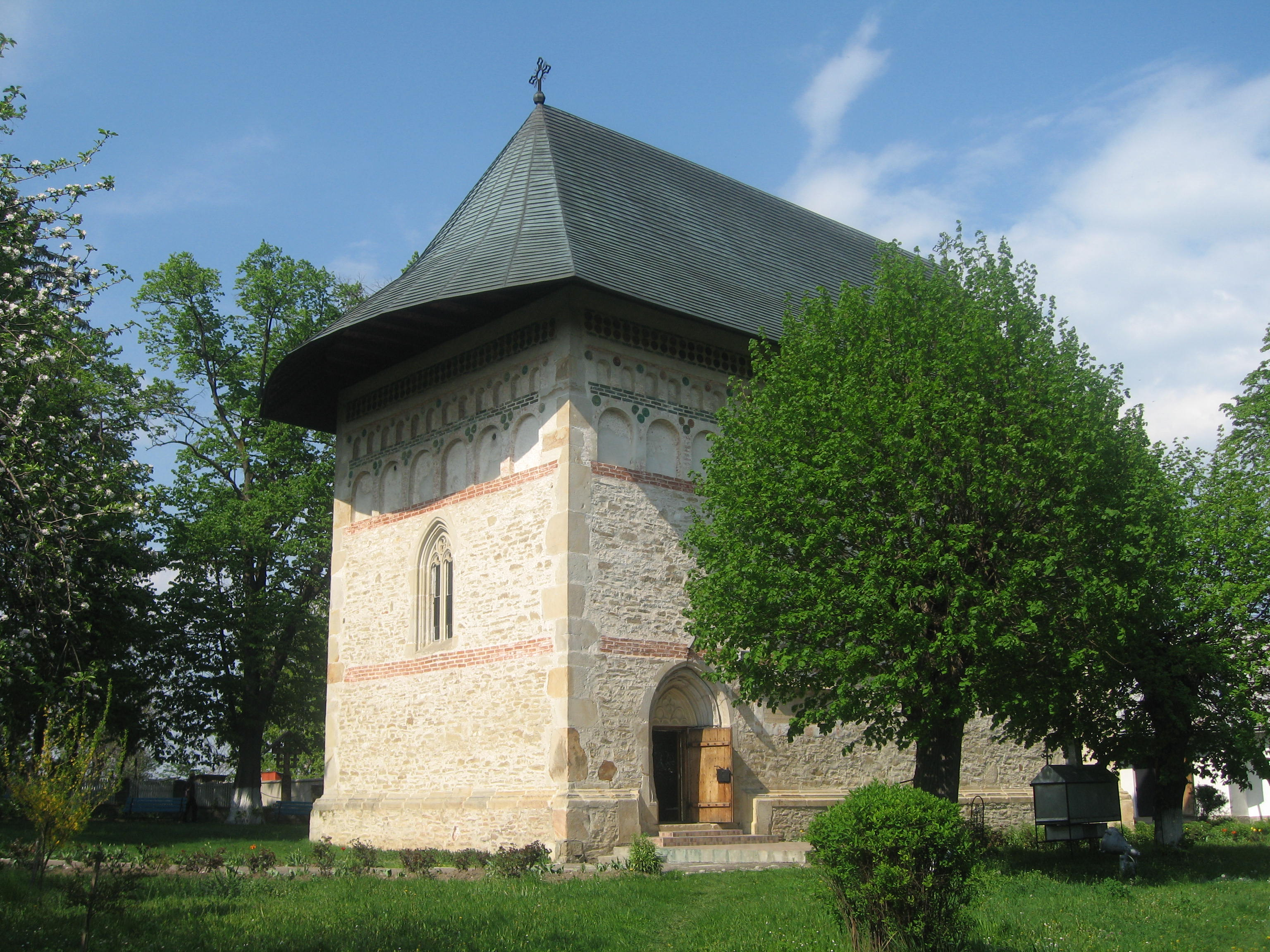 Mănăstirea Războieni, Neamț County, Romania